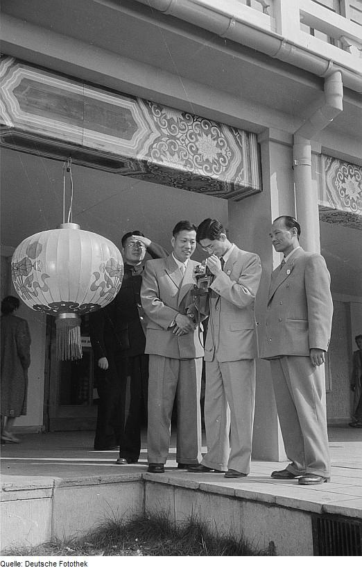 Original image description from the Deutsche Fotothek Mehrere Personen, darunter eine Fotografierende, unter den Kolonnaden des chinesischen Pavillons der Leipziger Herbstmesse 1954